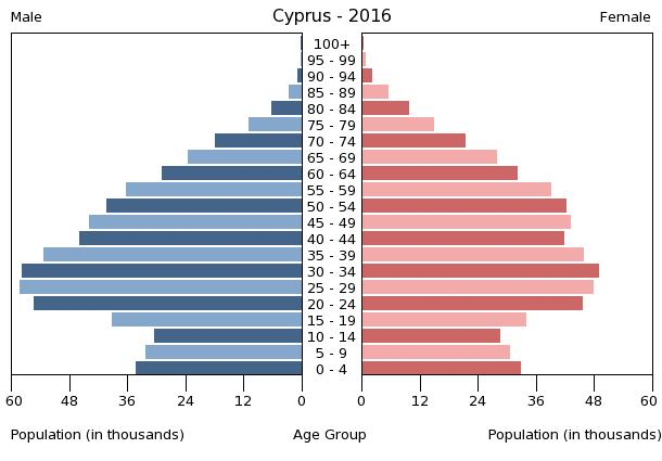 A population pyramid illustrates the age and sex structure of a country's population and may provide insights about political and social stability, as well as economic development. The population is distributed along the horizontal axis, with males shown on the left and females on the right. The male and female populations are broken down into 5-year age groups represented as horizontal bars along the vertical axis, with the youngest age groups at the bottom and the oldest at the top. The shape of the population pyramid gradually evolves over time based on fertility, mortality, and international migration trends.